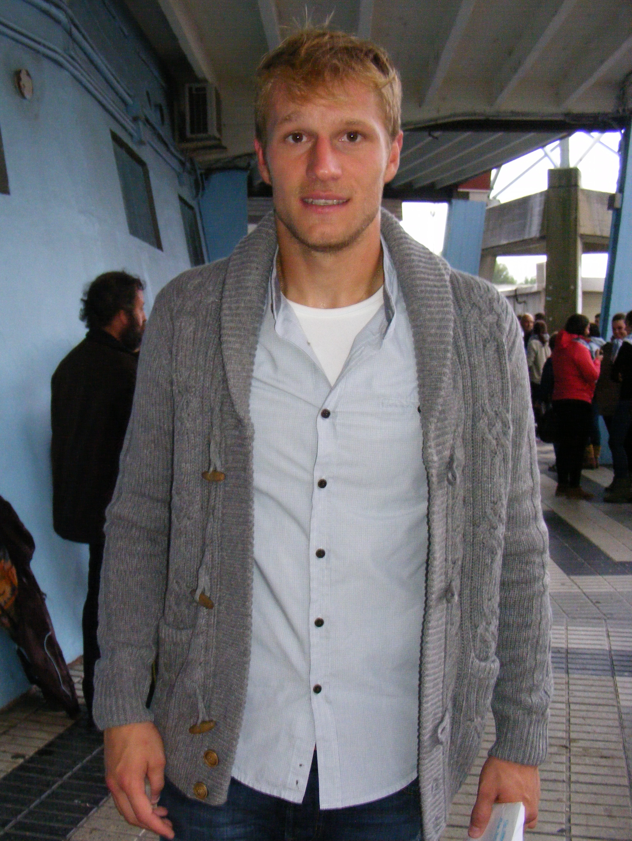 Yoel Rodríguez Oterino después del partido Celta-Elche